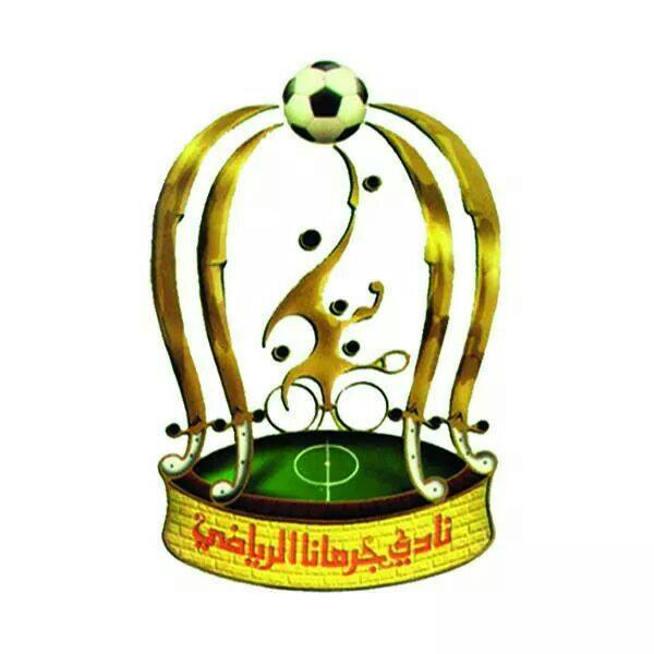 نادي جرمانا الرياضي